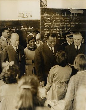 Le président Hubert Maga de la République du Dahomey et madame rendent une visite à une école de Torcy. À gauche sur la photo, Jacques Foccart, secrétaire général à la présidence de la République pour les affaires africaines et malgaches. À droite, monsieur Guy Chavanne, maire de Torcy.